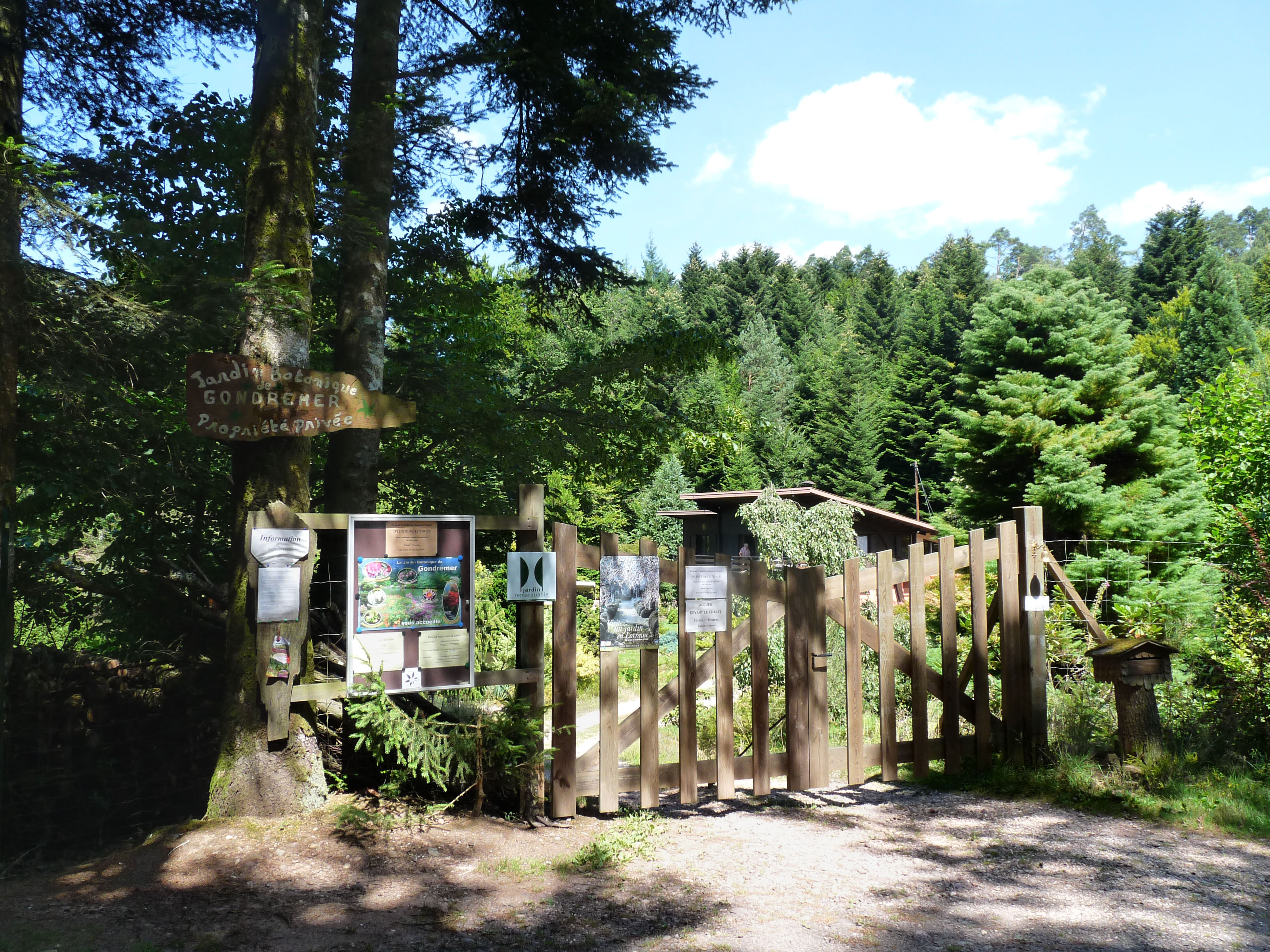 Entrée du Jardin botanique de Gondremer (Vosges)